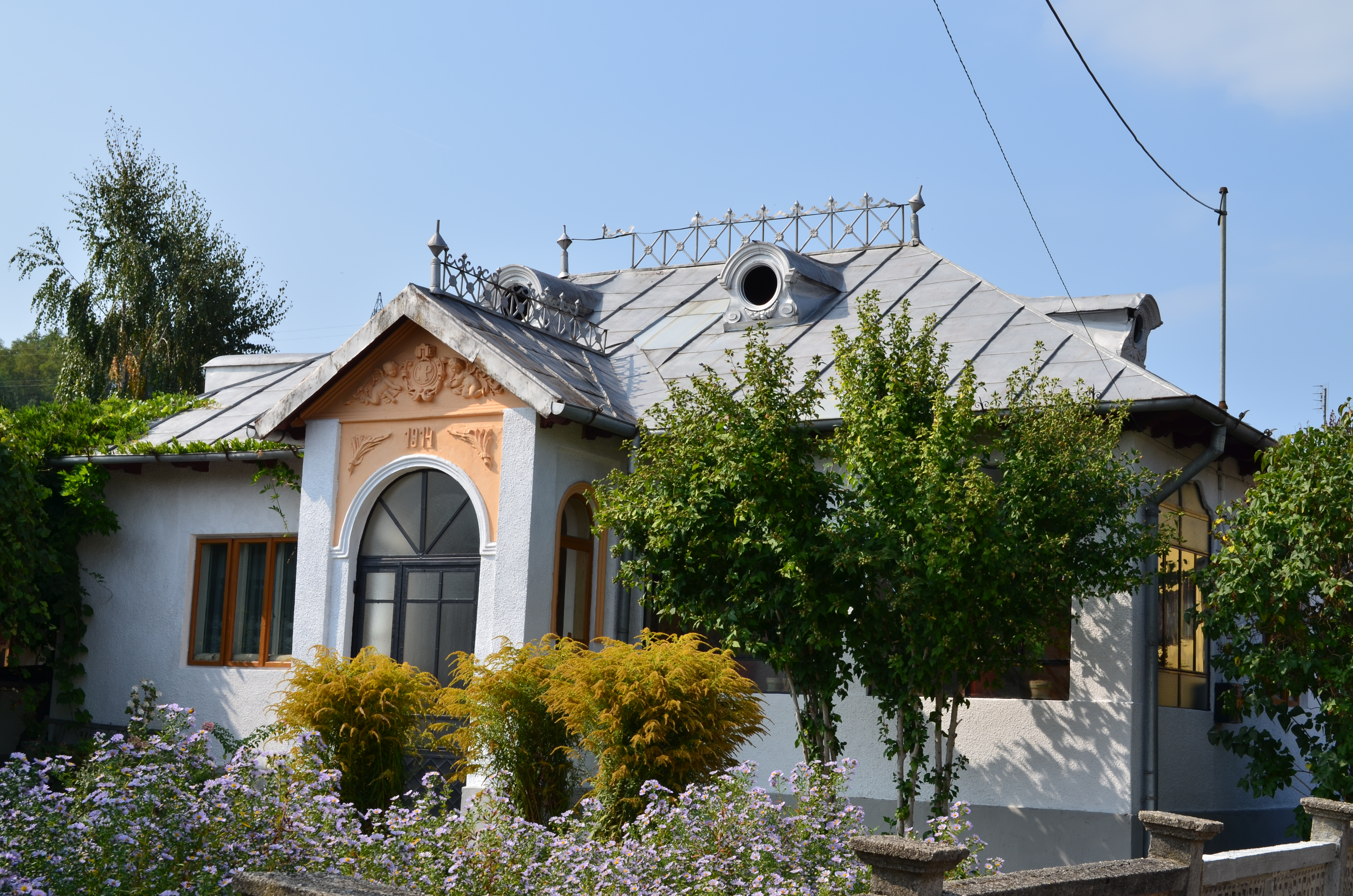 Casa Paraschiva Chivulescu, Vălenii de Munte, Prahova